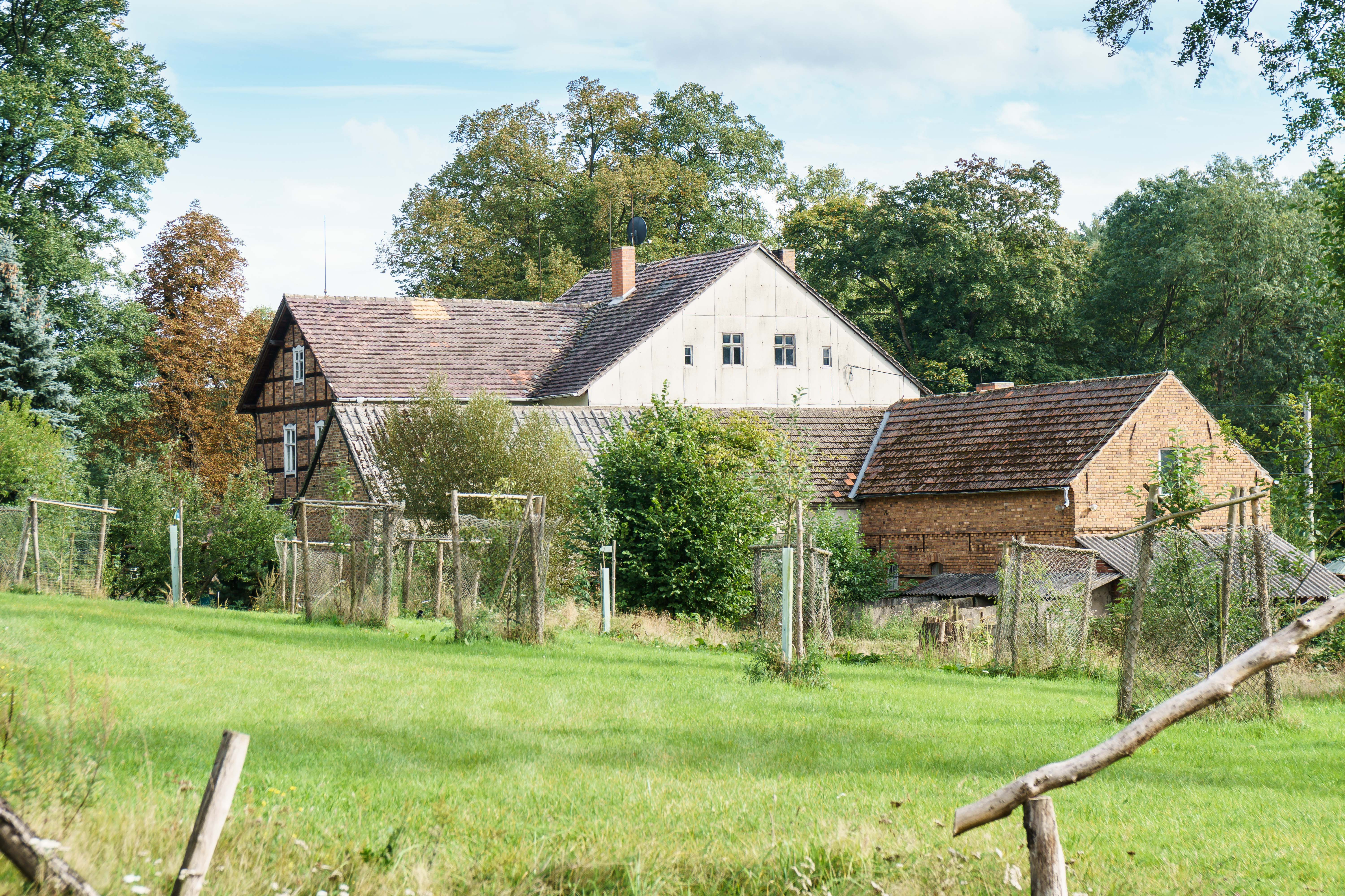 Lochmühle östlich der K 6256 im Wald am Schweinitzer Fließ in Hohenbucko